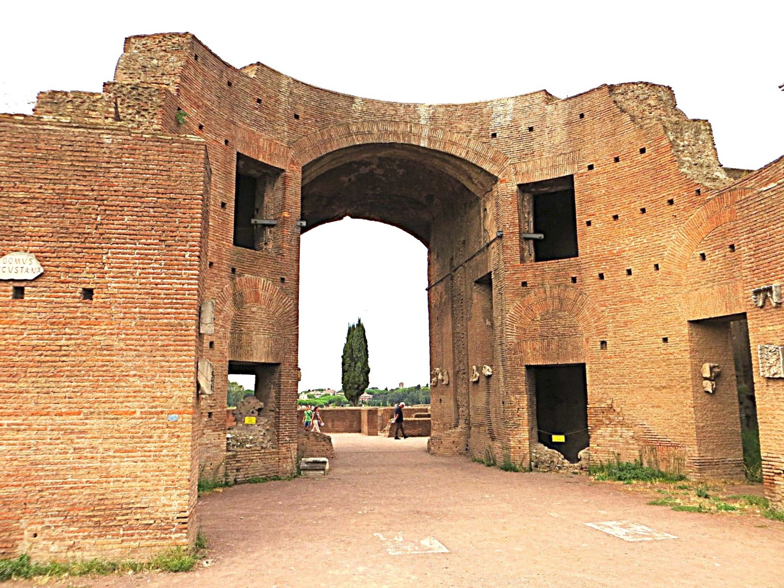 Palatino